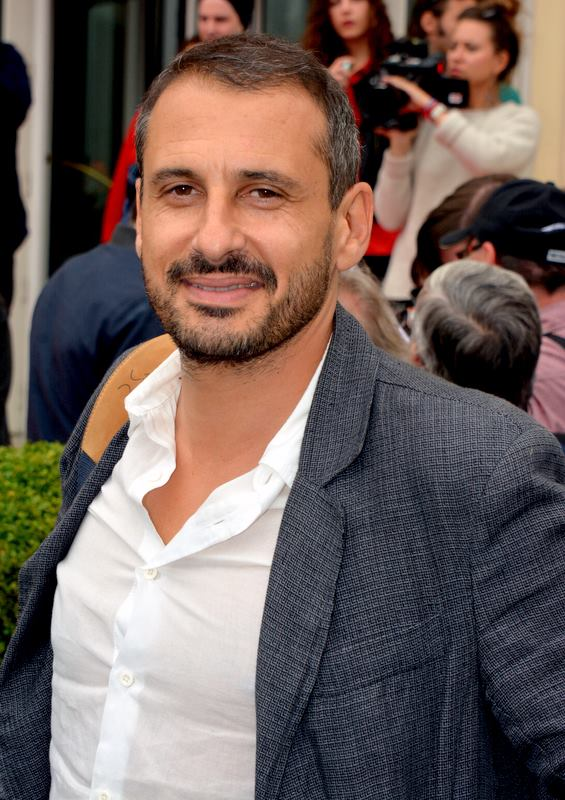 Safy Nebbou au festival de Cabourg